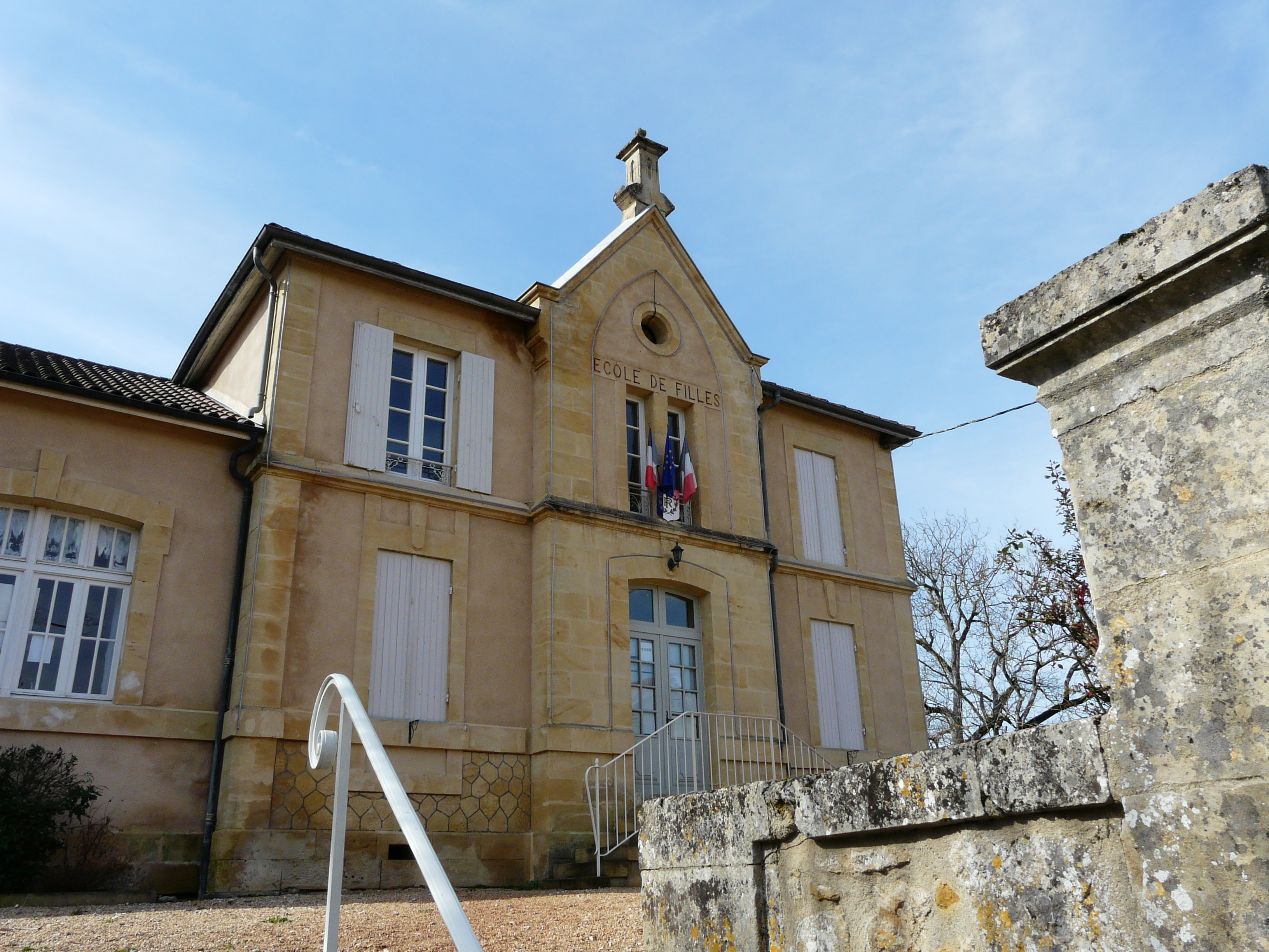 La mairie de Lanquais, Dordogne, France.